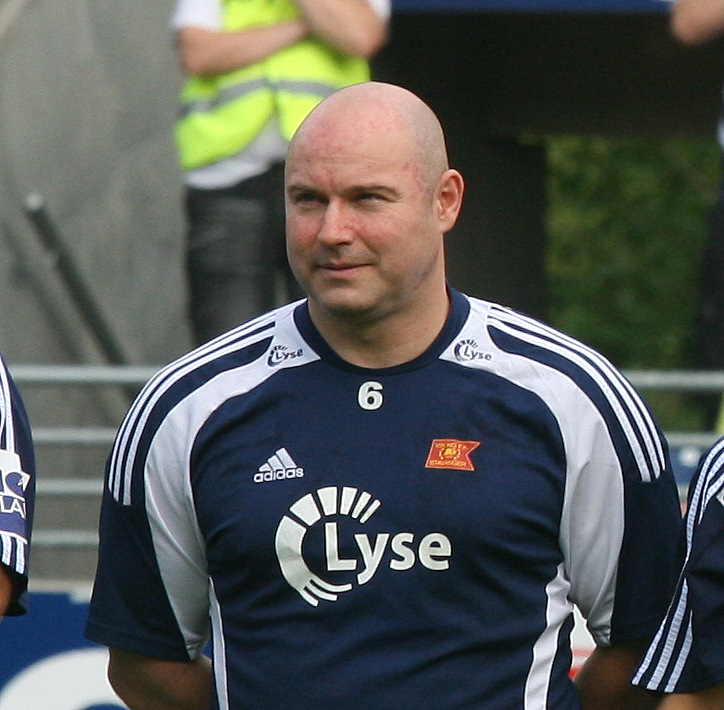 Erik Tangen